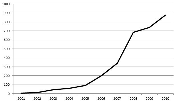 Динамика рынка интернет-рекламы России